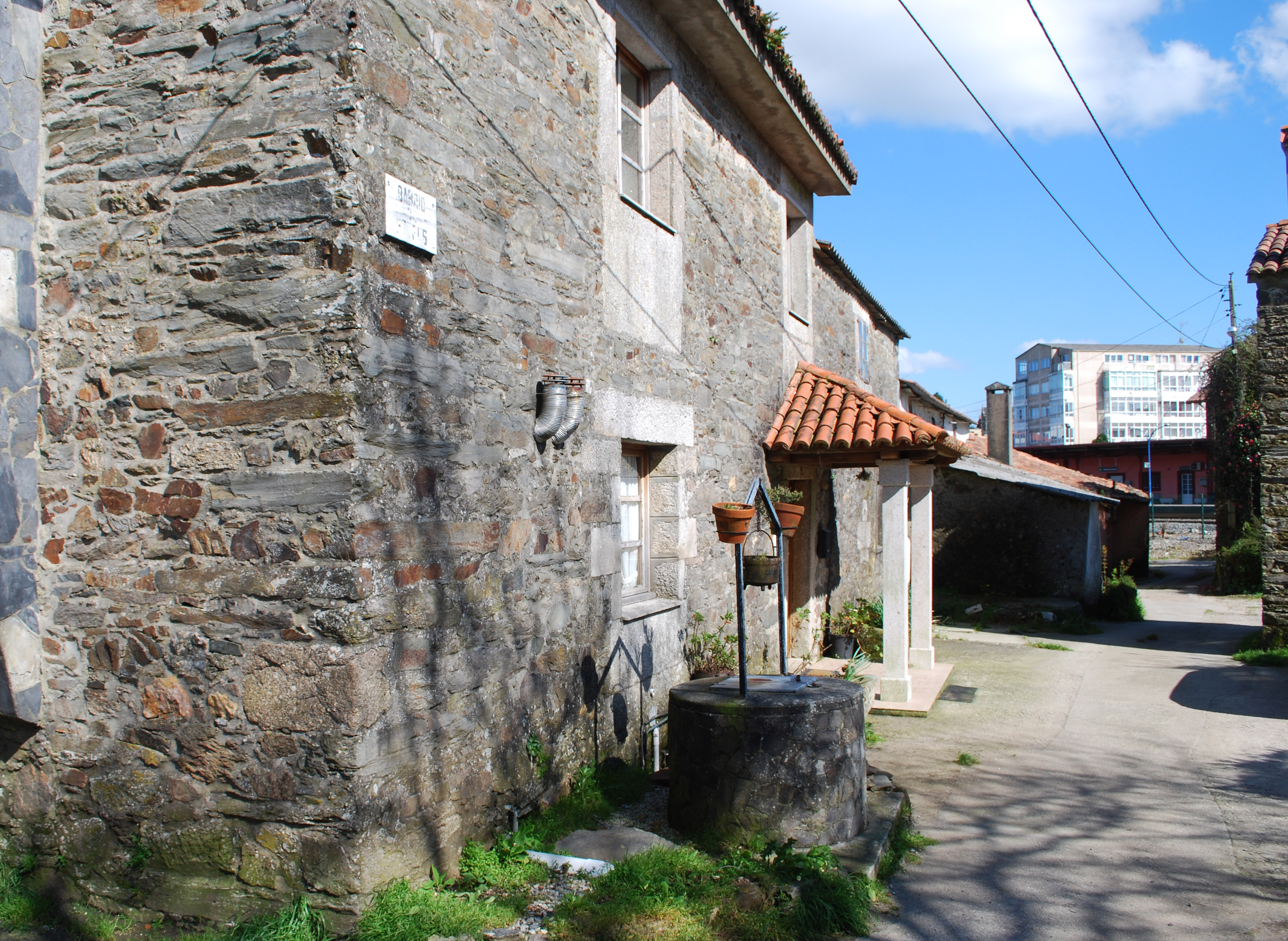 Vista do barrio de Bodeus e estación de Curtis A Coruña Galiza